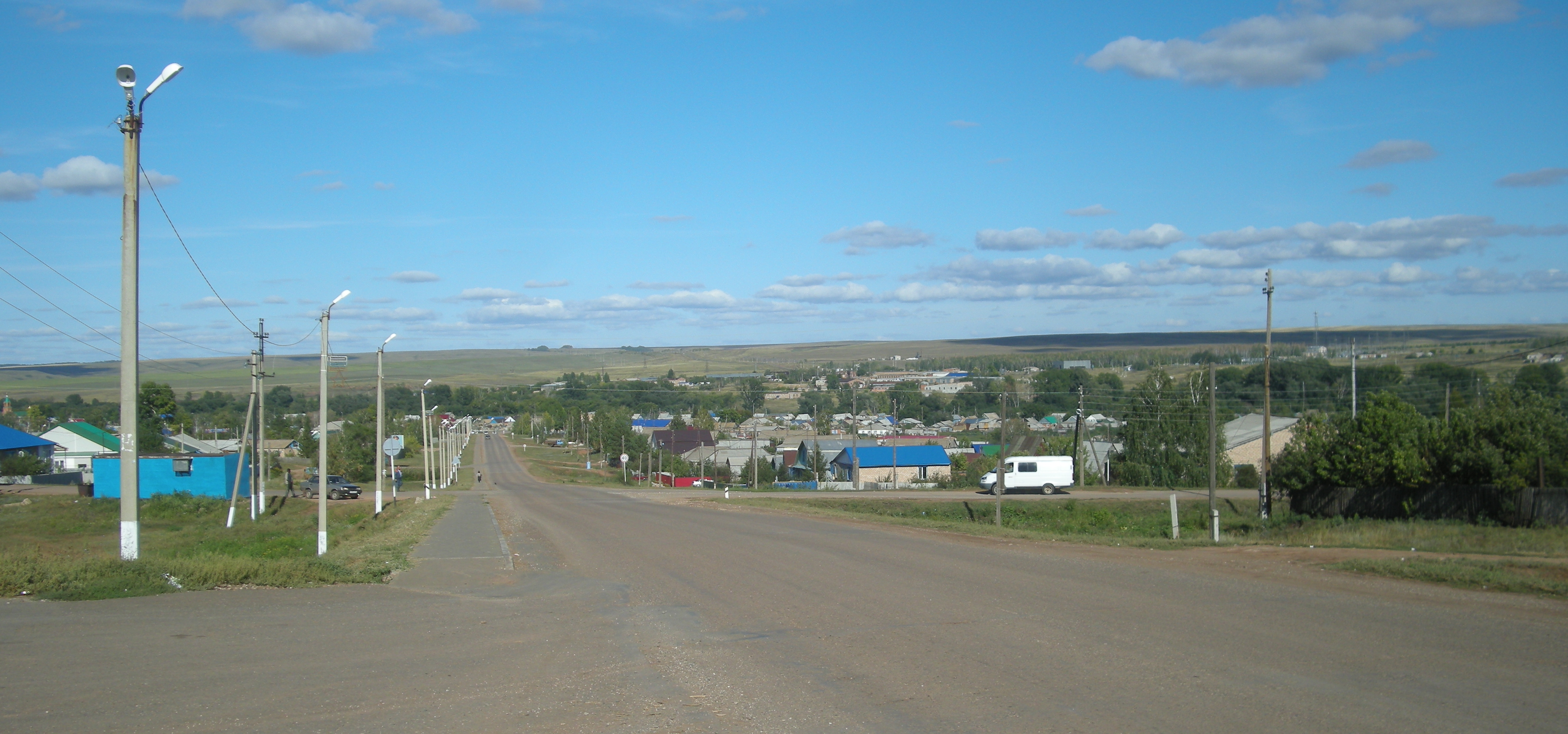 Оренбургская область, райцентр Александровка